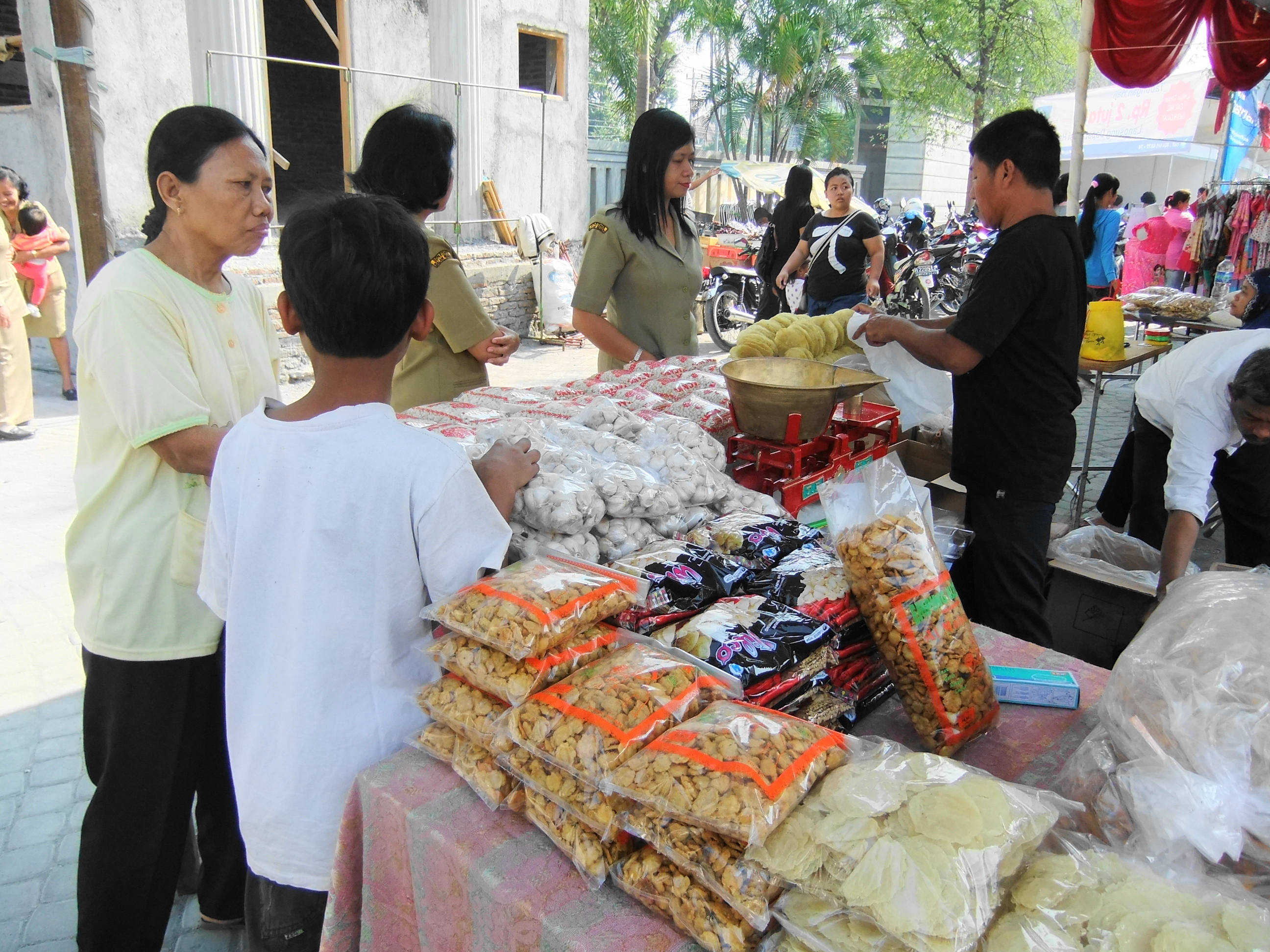 Membeli kebutuhan Lebaran di Bazar Ramadhan, Balai Kota Semarang